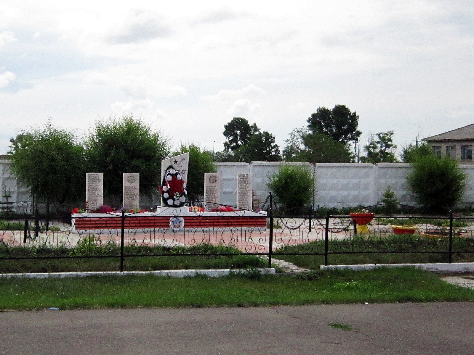 Село Московское. Хакасия. Мемориал погибшим односельчанам в Великой Отечественной войне.